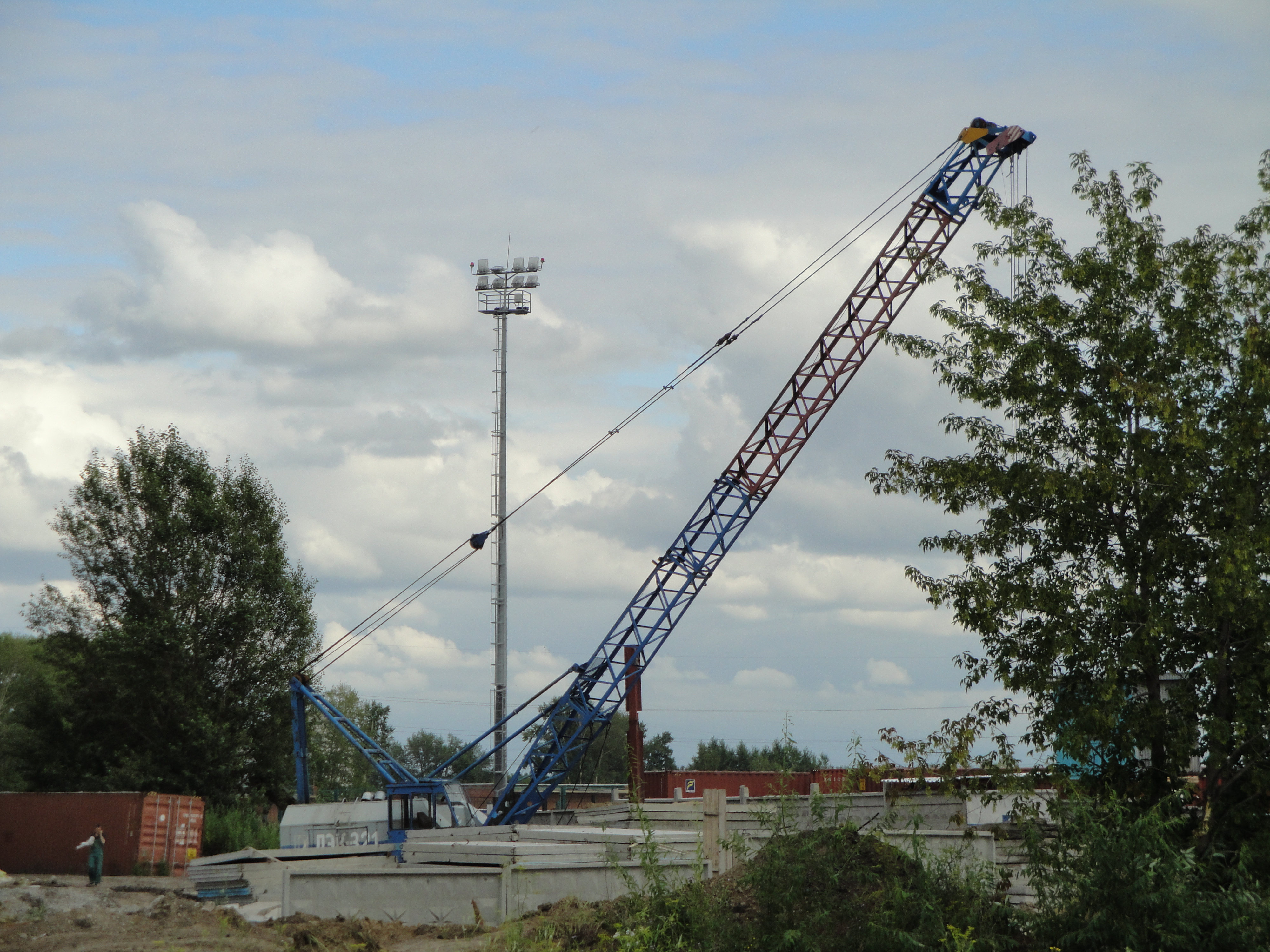 Гусеничный кран ДЭК-321 - Новосибирск